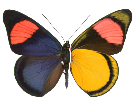 Nymphalidae Ecuador